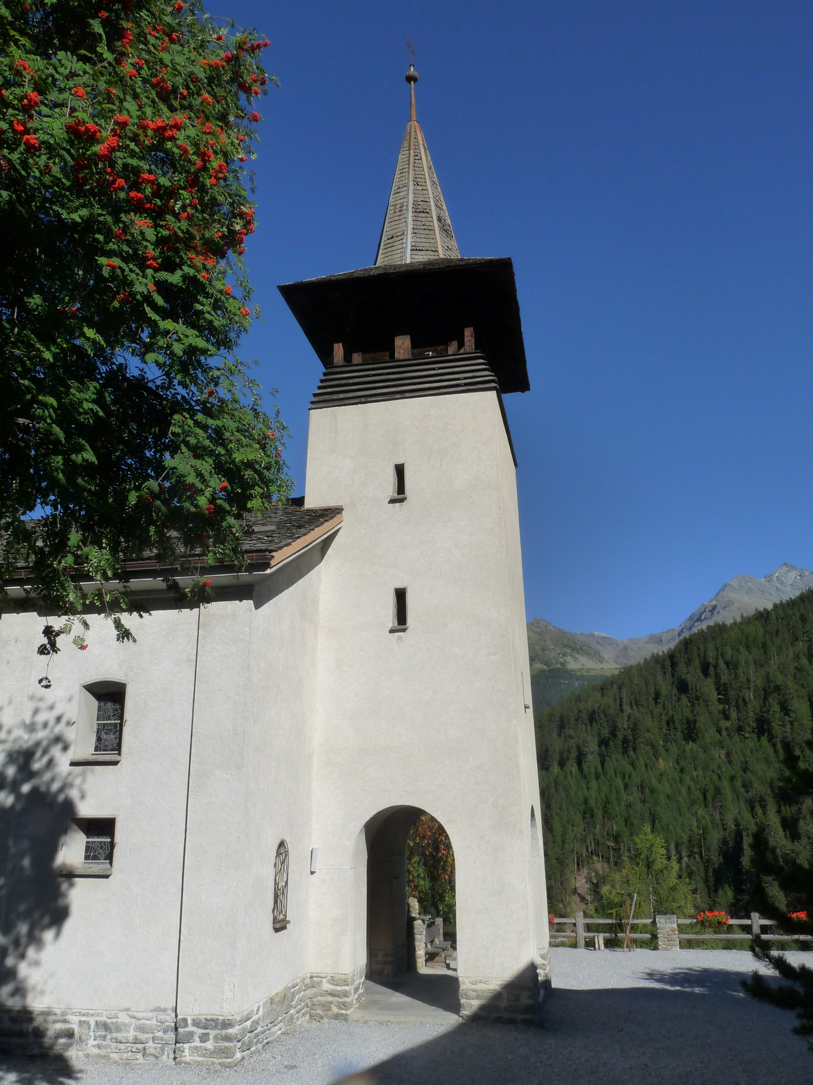 Eglise de Grimentz (Valais, Suisse)